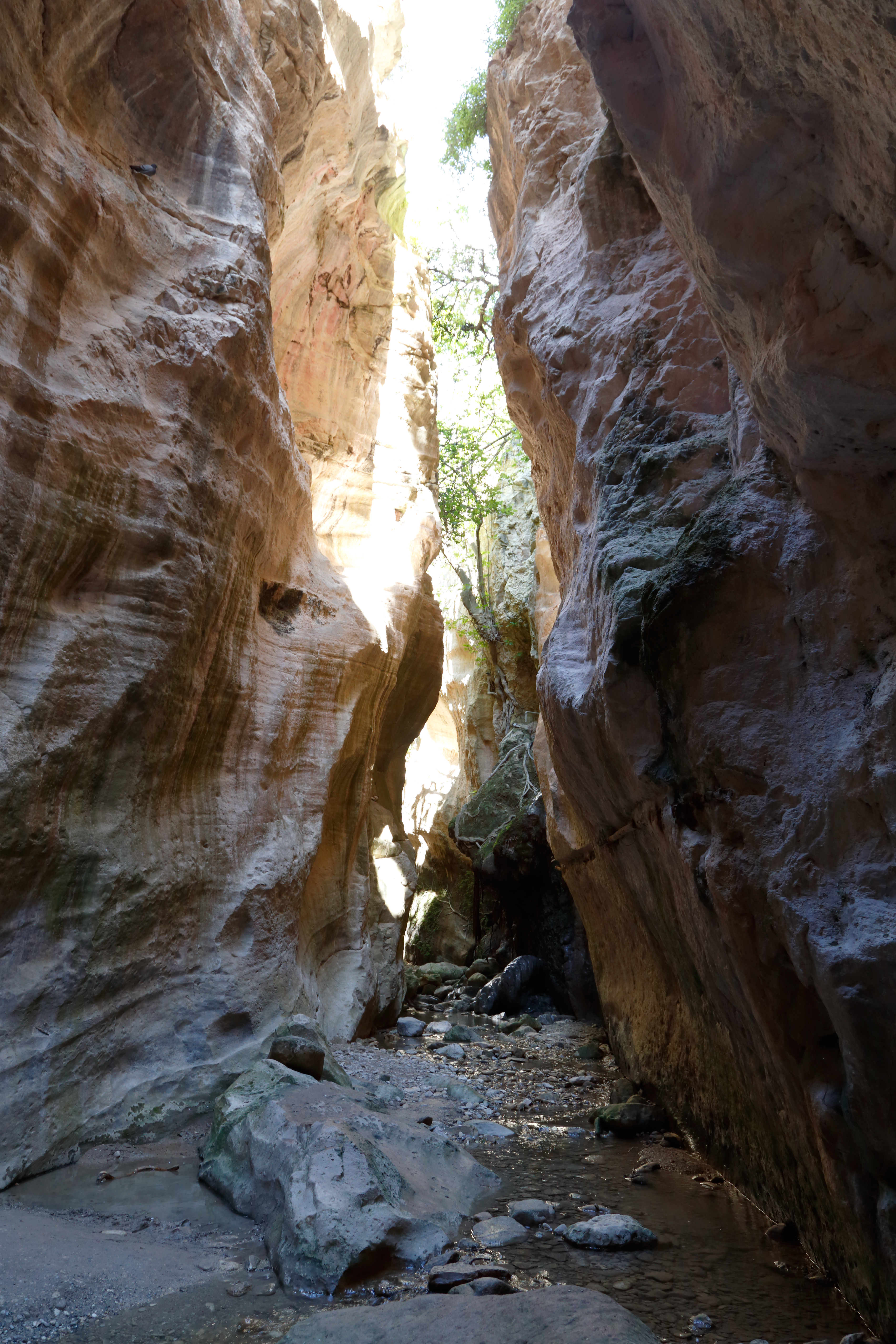 Avakas Gorge, Akamas Peninsula, Cyprus